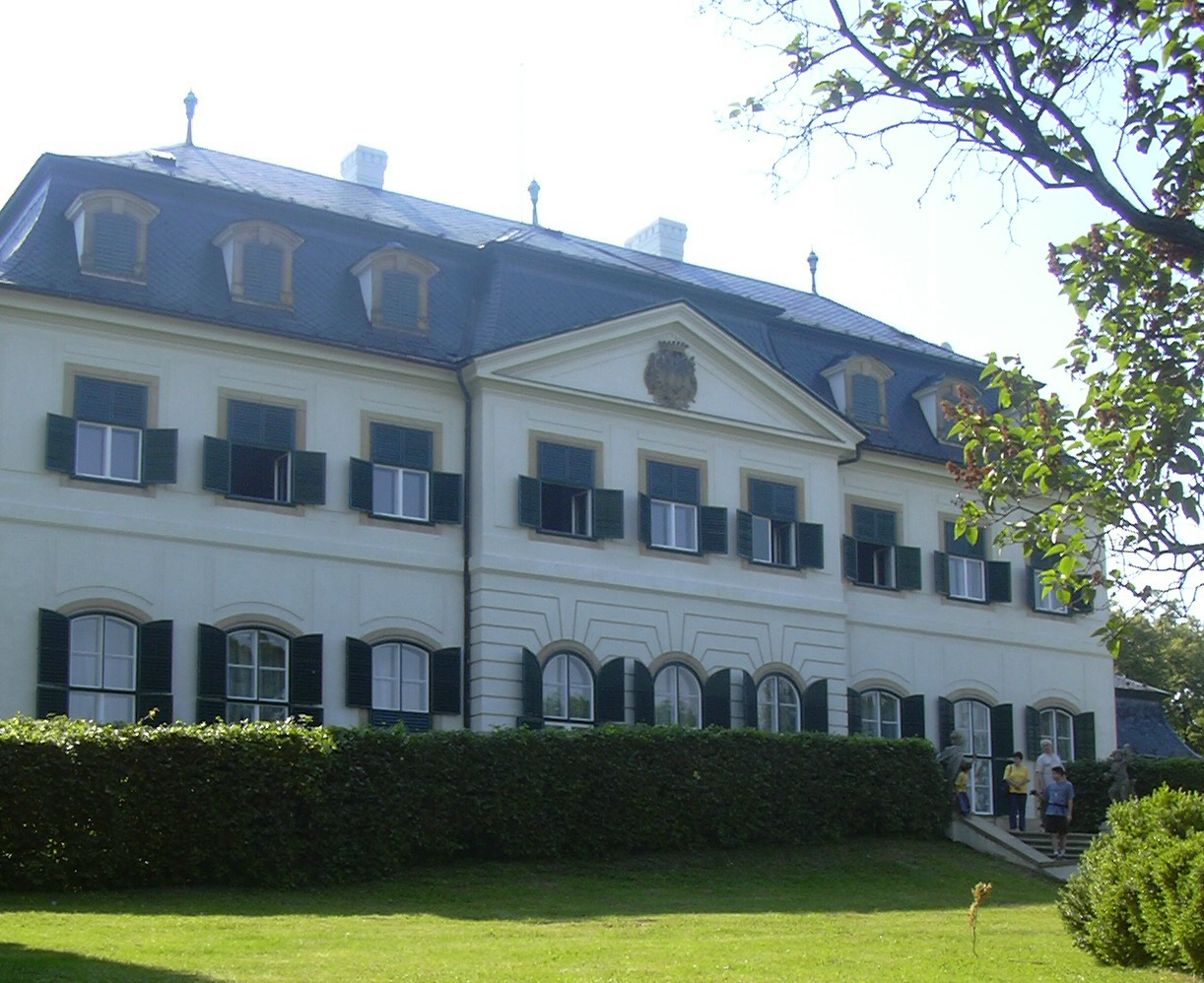 zámek (Náměšť na Hané- czech republic)